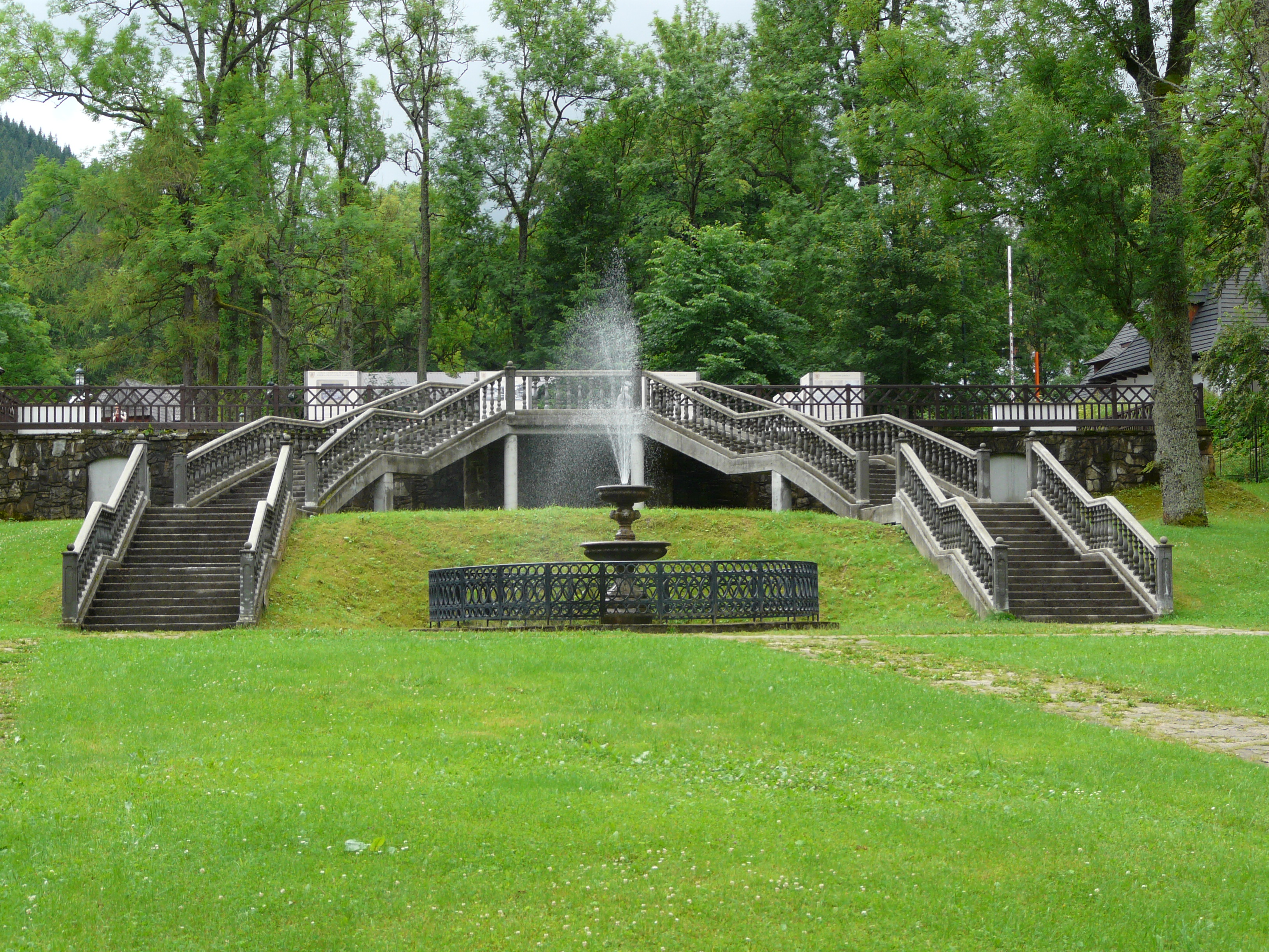 Zakopane. Zespół dworsko-parkowy w Kuźnicach, okolice i wnętrza.